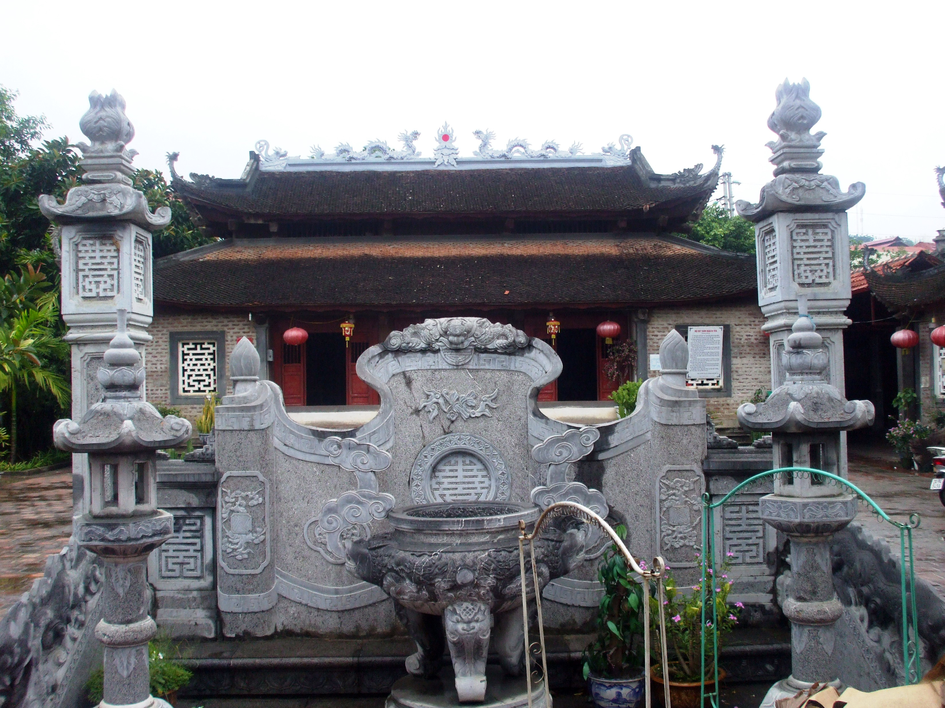 Đền Mẫu Lào Cai tọa lạc tại cộc mốc biên giới số 102 giữa Việt Nam và Trung Quốc, gần Cửa khẩu quốc Lào Cai.